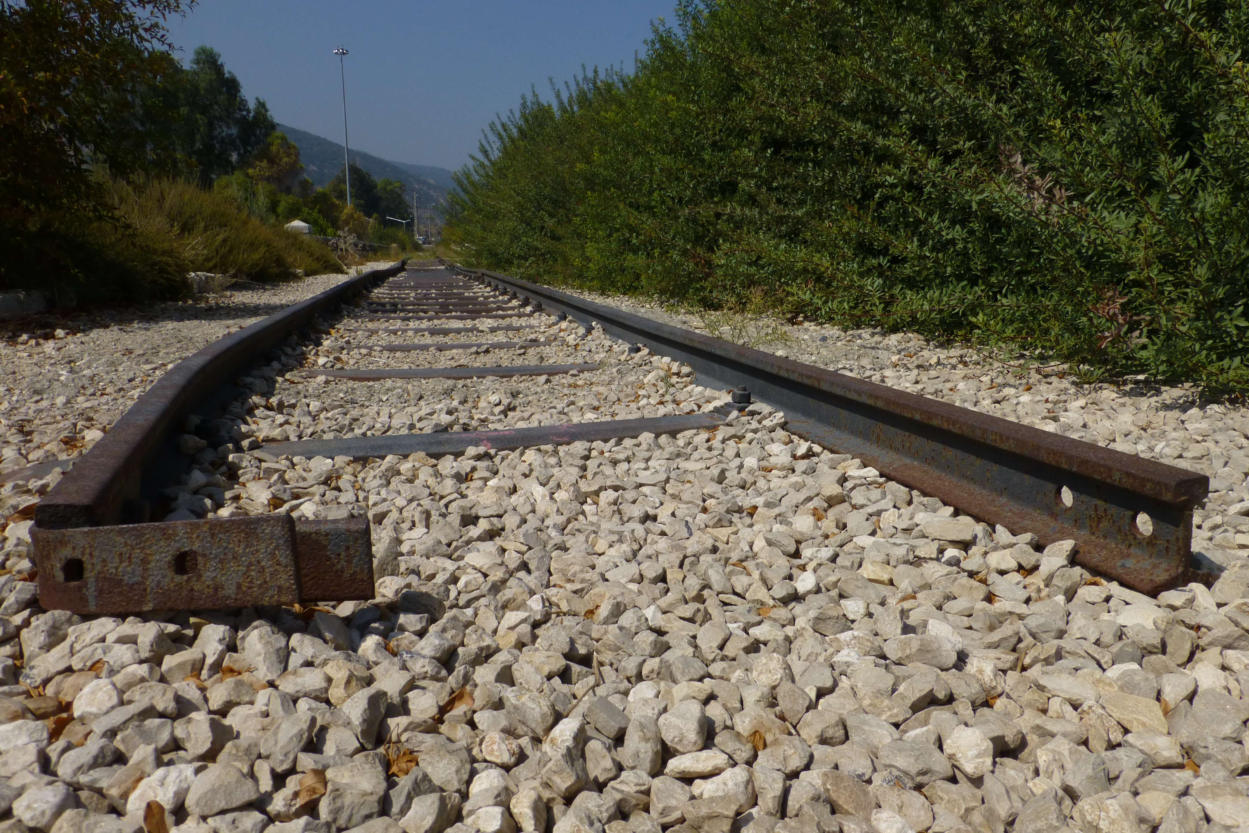 רכבת העמק - מעבירי מים והסוללה - צומת העמקים